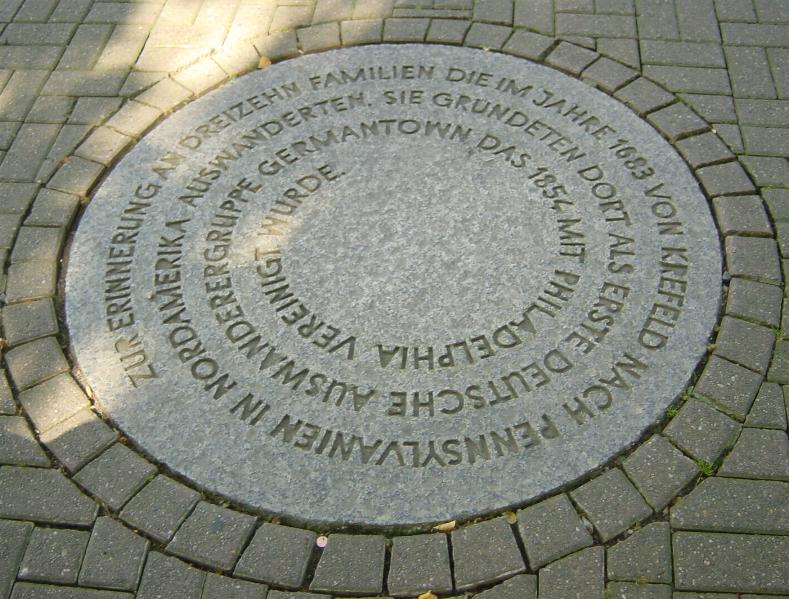 Bildbeschreibung: Denkmal für die Auswanderer aus Krefeld nach Philadelphia, Krefeld Quelle: selbst fotografiert Fotograf/Zeichner: DER UNFASSBARE